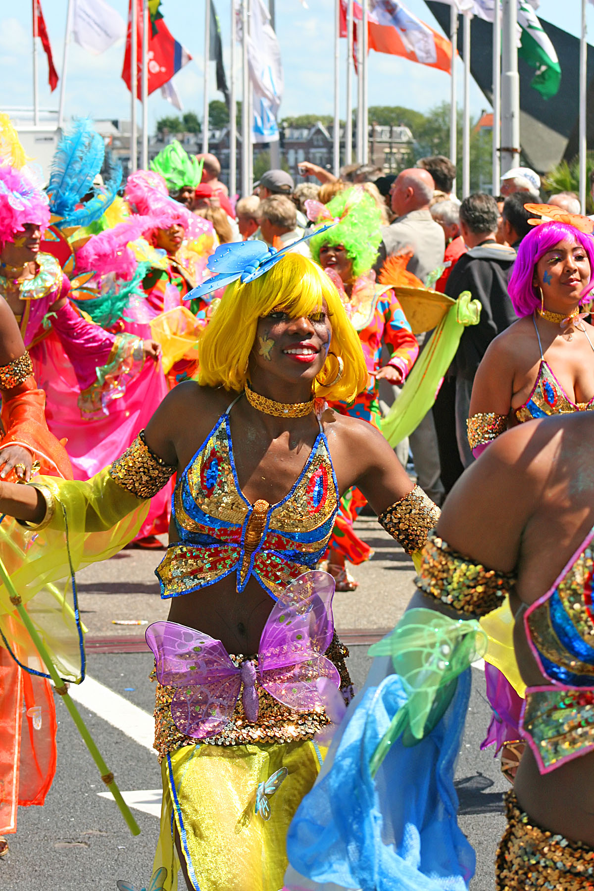 Summer Carnival / Zomercarnaval 2007